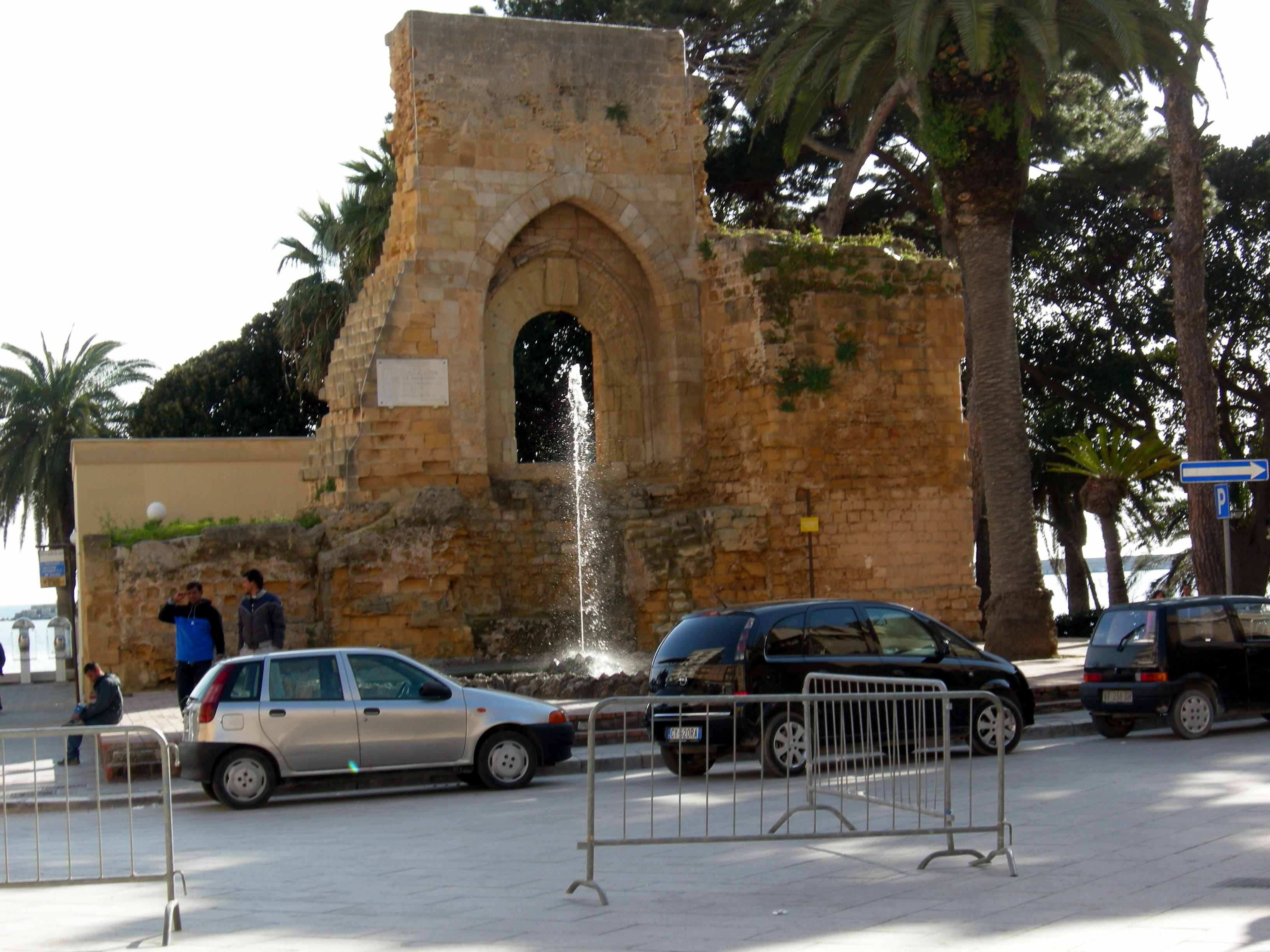 Arco Normanno, Mazara del Vallo, Sicily, Italy